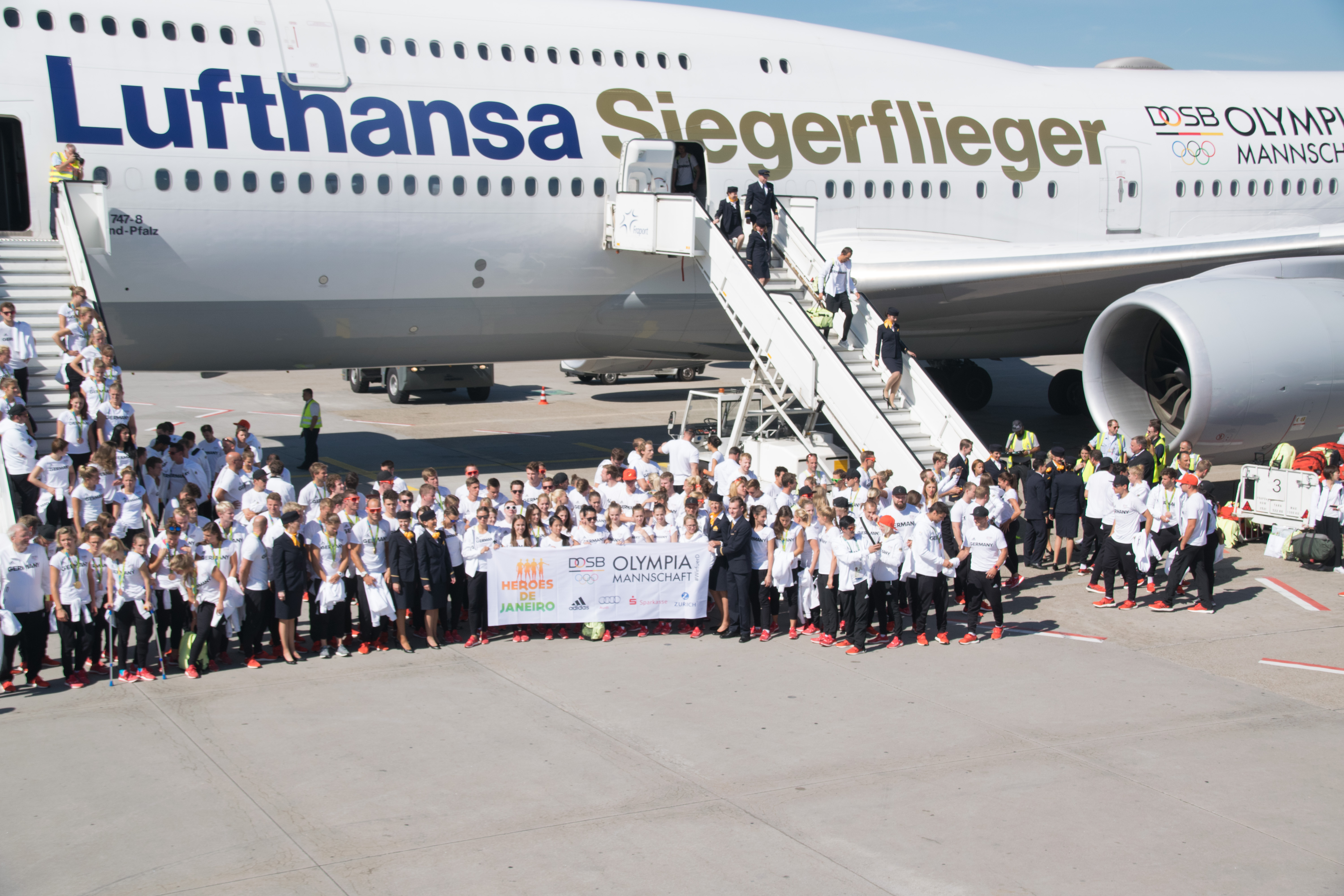 Empfang der deutschen Olympiamannschaft am Frankfurt Flughafen am 23. August 2016. Ankunft mit LH 511